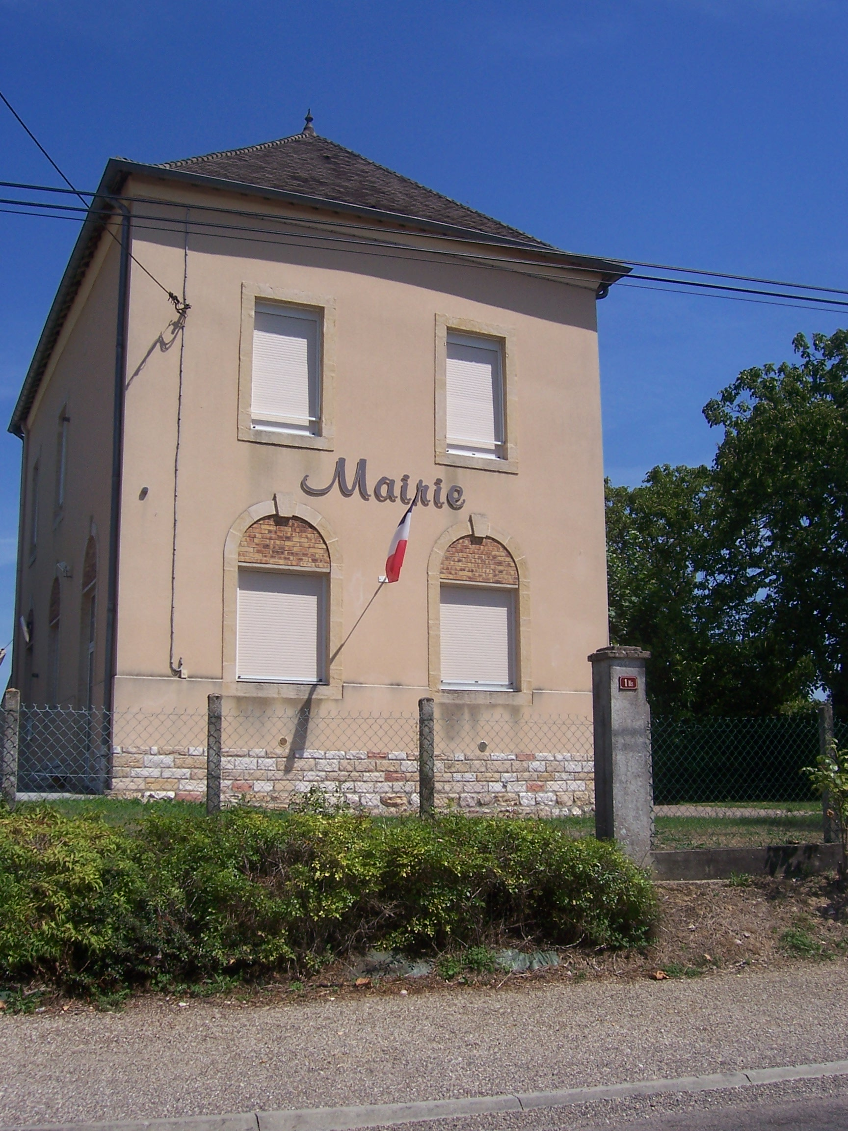 Mairie de Guerfand